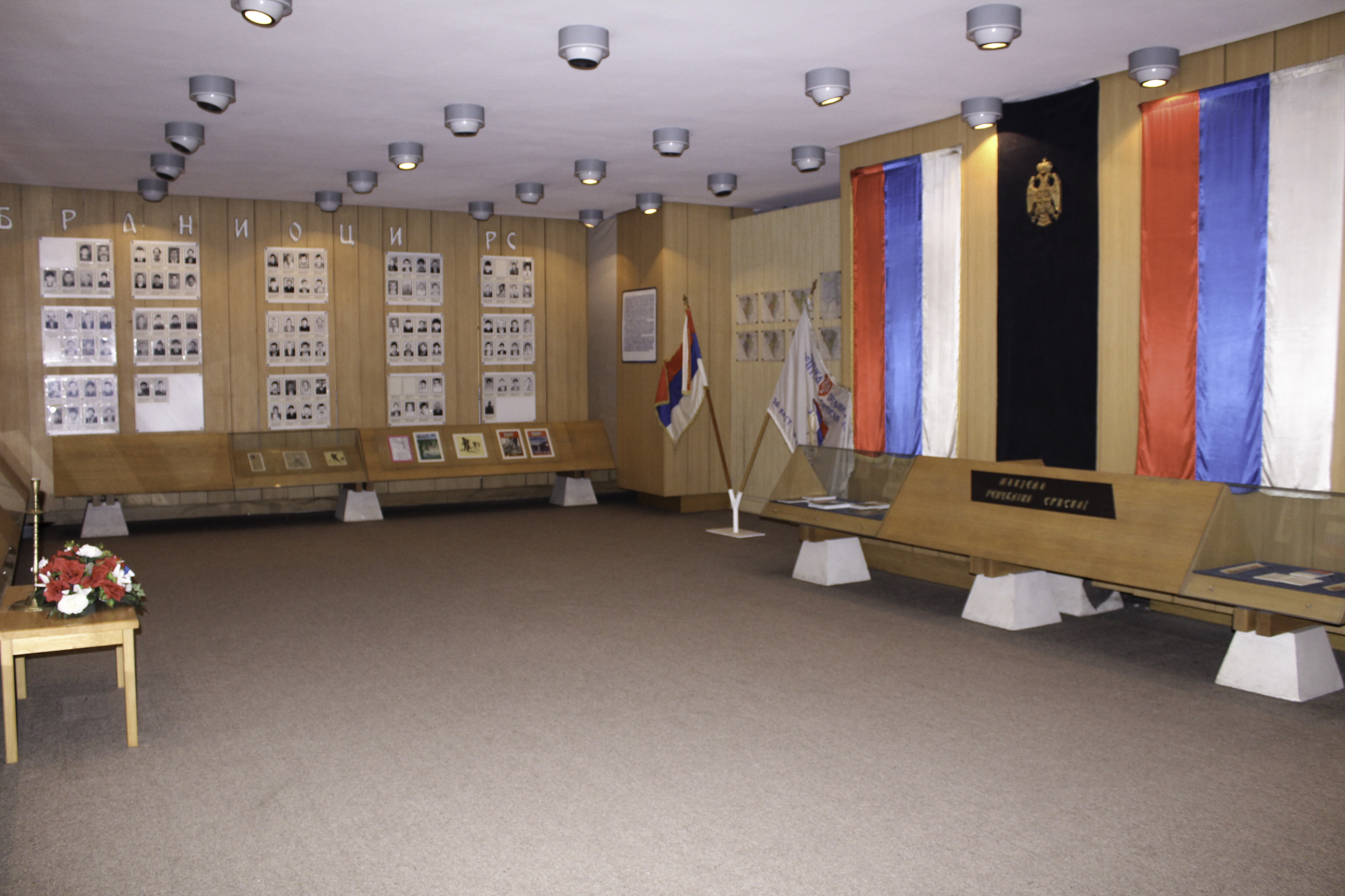 Spomen soba palim borcima i civilnim žrtvama Odbrambeno-otadžbinskog rata u Muzeju Stare Hercegovine u Foči - detalj.